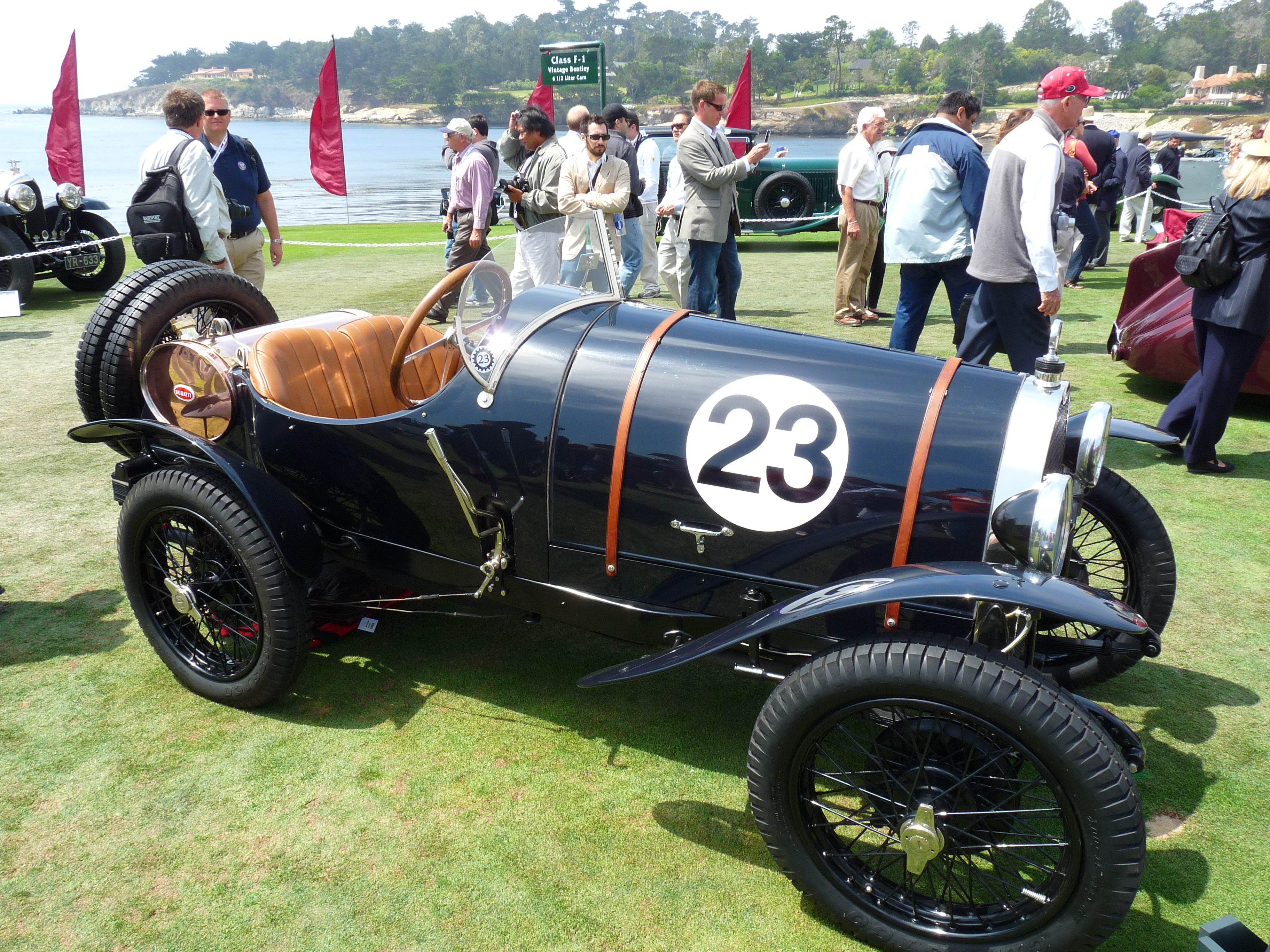 1920 Bugatti Type 13 Brescia Dog Cart